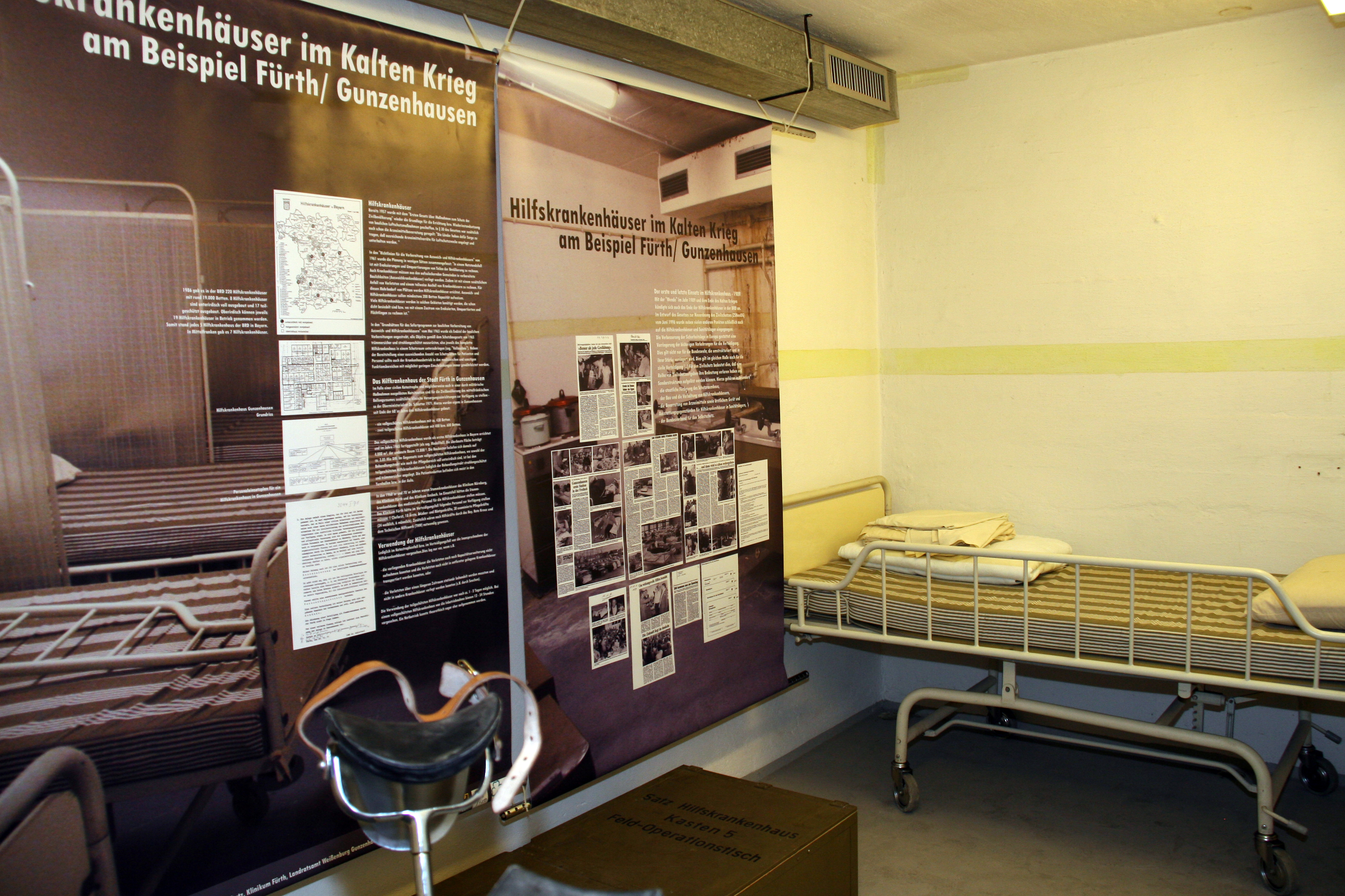 Ausstellung in Fürth (Schwandbunker) zum Hilfskrankenhaus Gunzenhausen, Sept. 2009